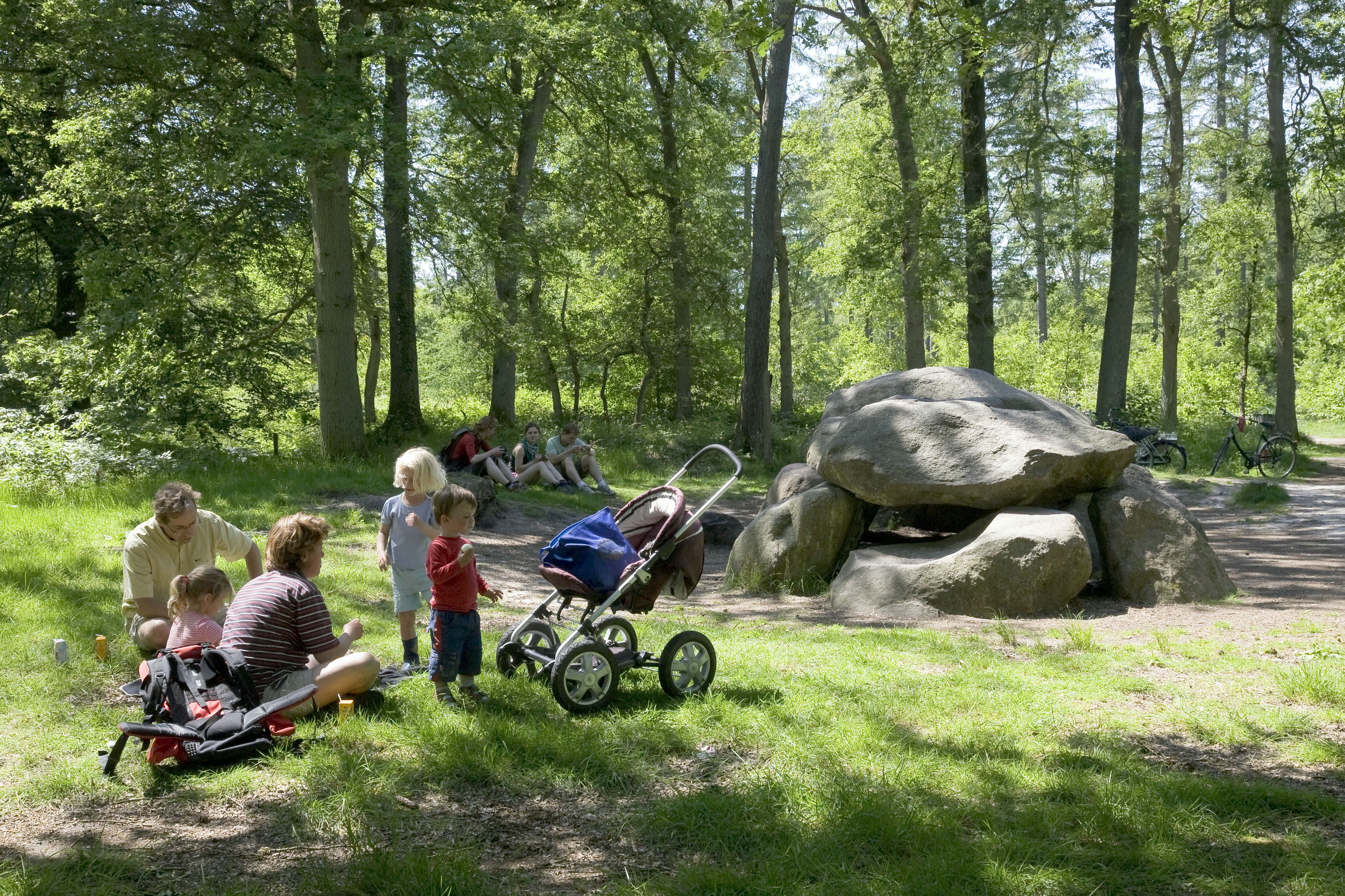 Hunebed D8: Strubben-Kniphorstbos, archeologisch reservaat, recreatie bij hunebed D8 (opmerking: Gemaakt voor publicatie landschapsbiografie Drentse Aa)